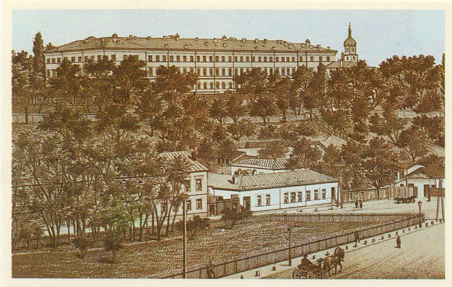 Здание Киевского института благородных девиц